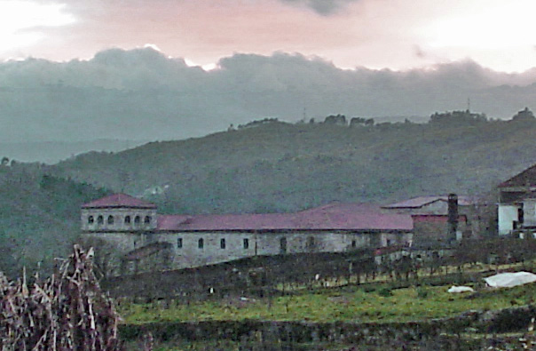 Mosteiro de San Clodio de Leiro. Vista xeral do lado este